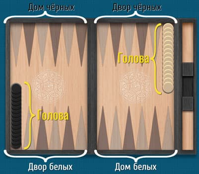 Секторы доски